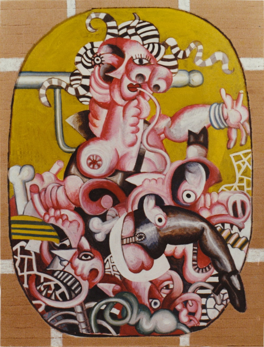 Tableau: La belle charcutière